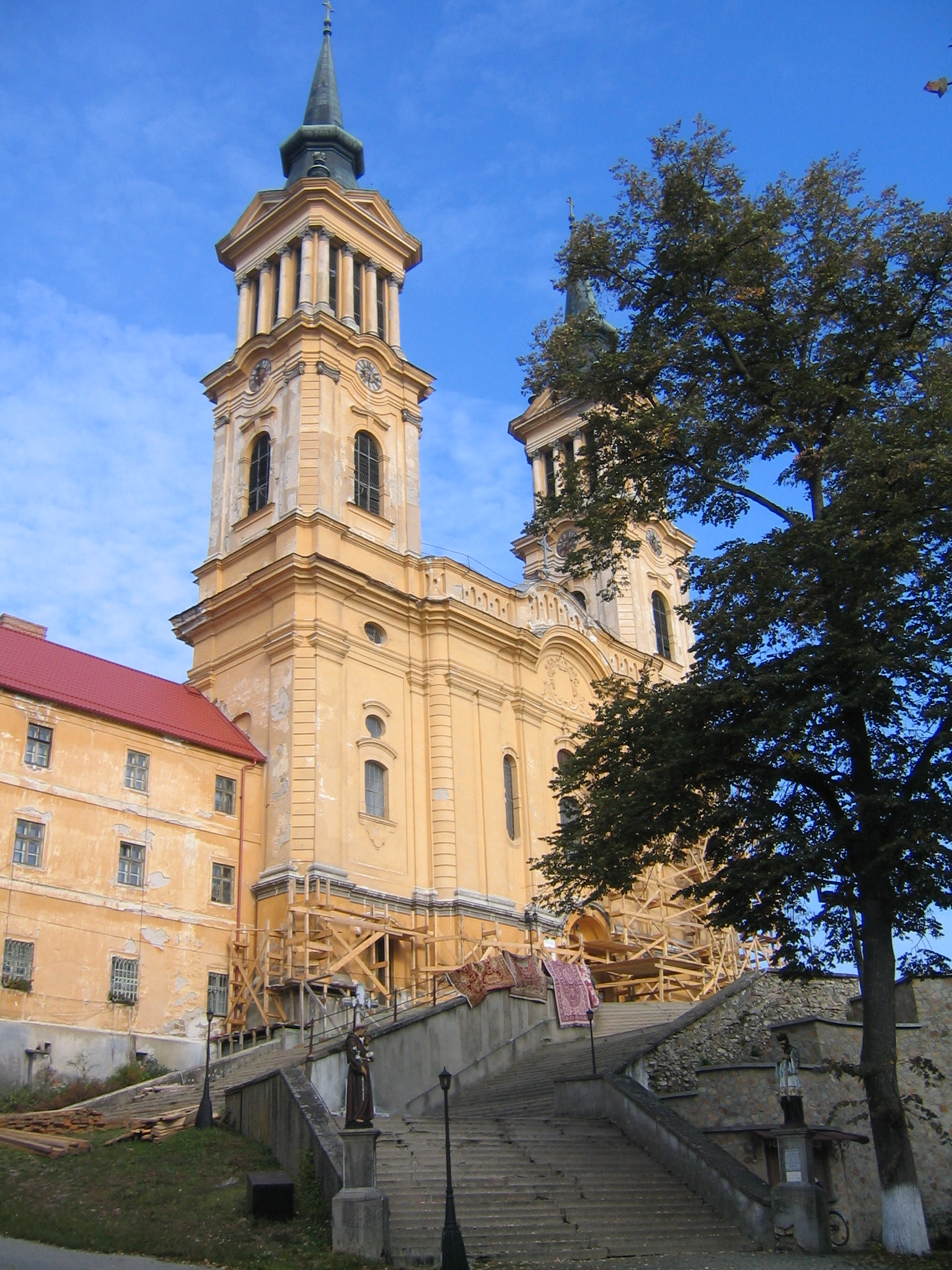 Biserica manastirii Sf. Maria Radna, Lipova 01